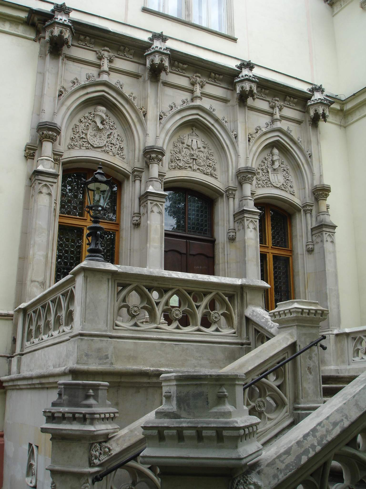 Krzyżanowice - palace